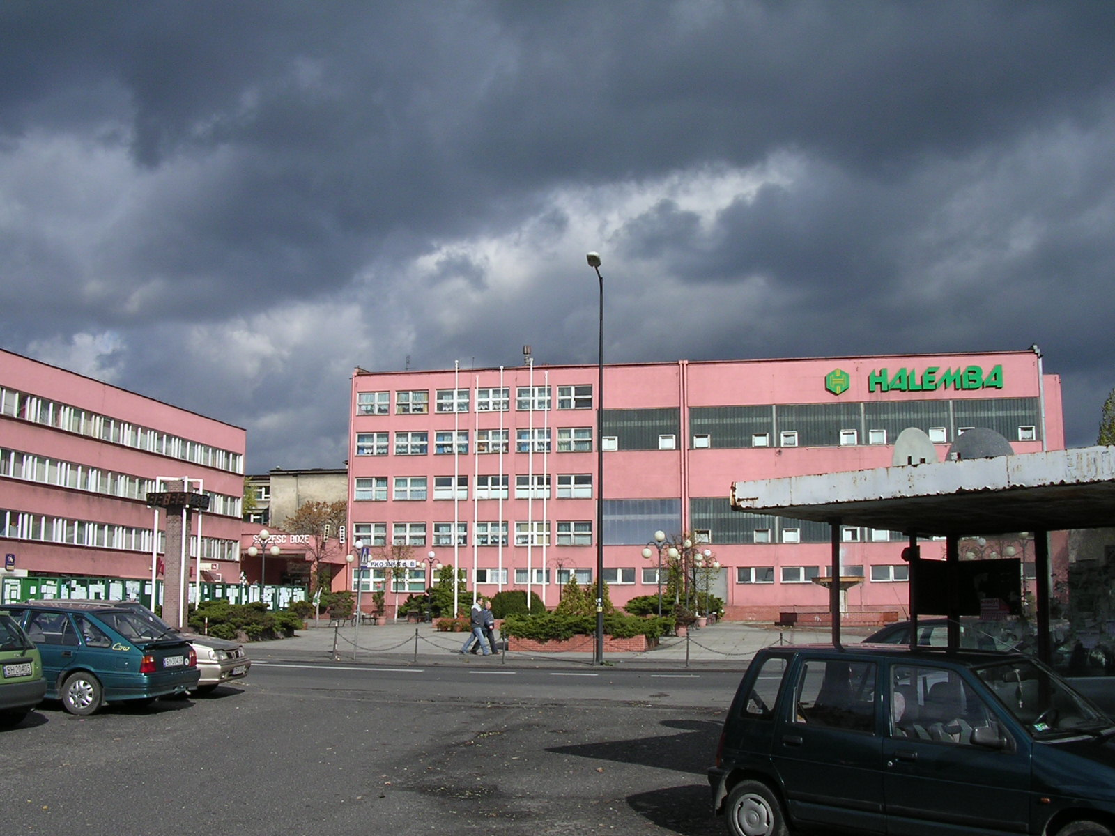 Bürogebäude des Steinkohlebergwerks Halemba.